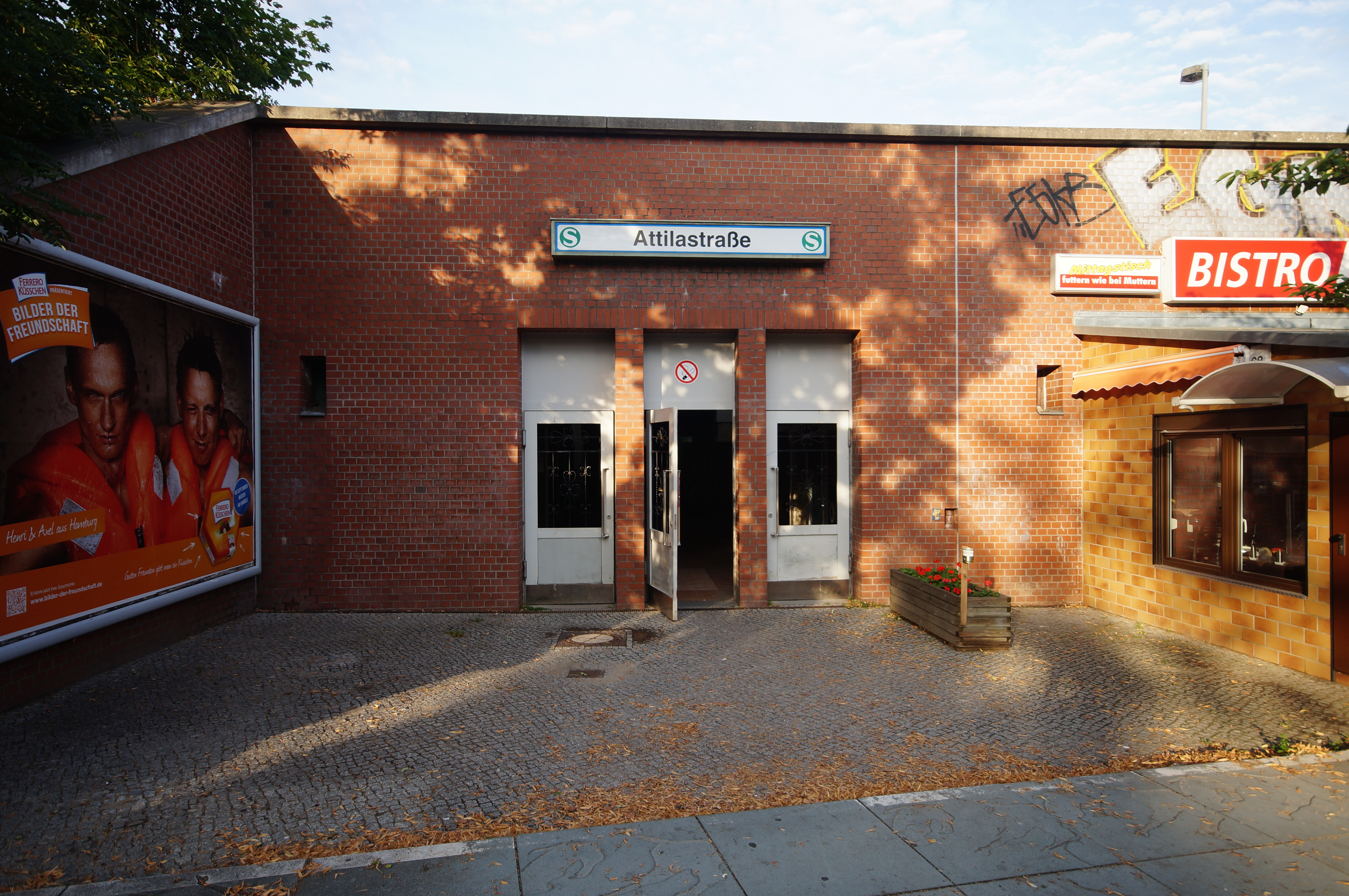 Haupteingang des Bahnhofs Berlin Attilastraße